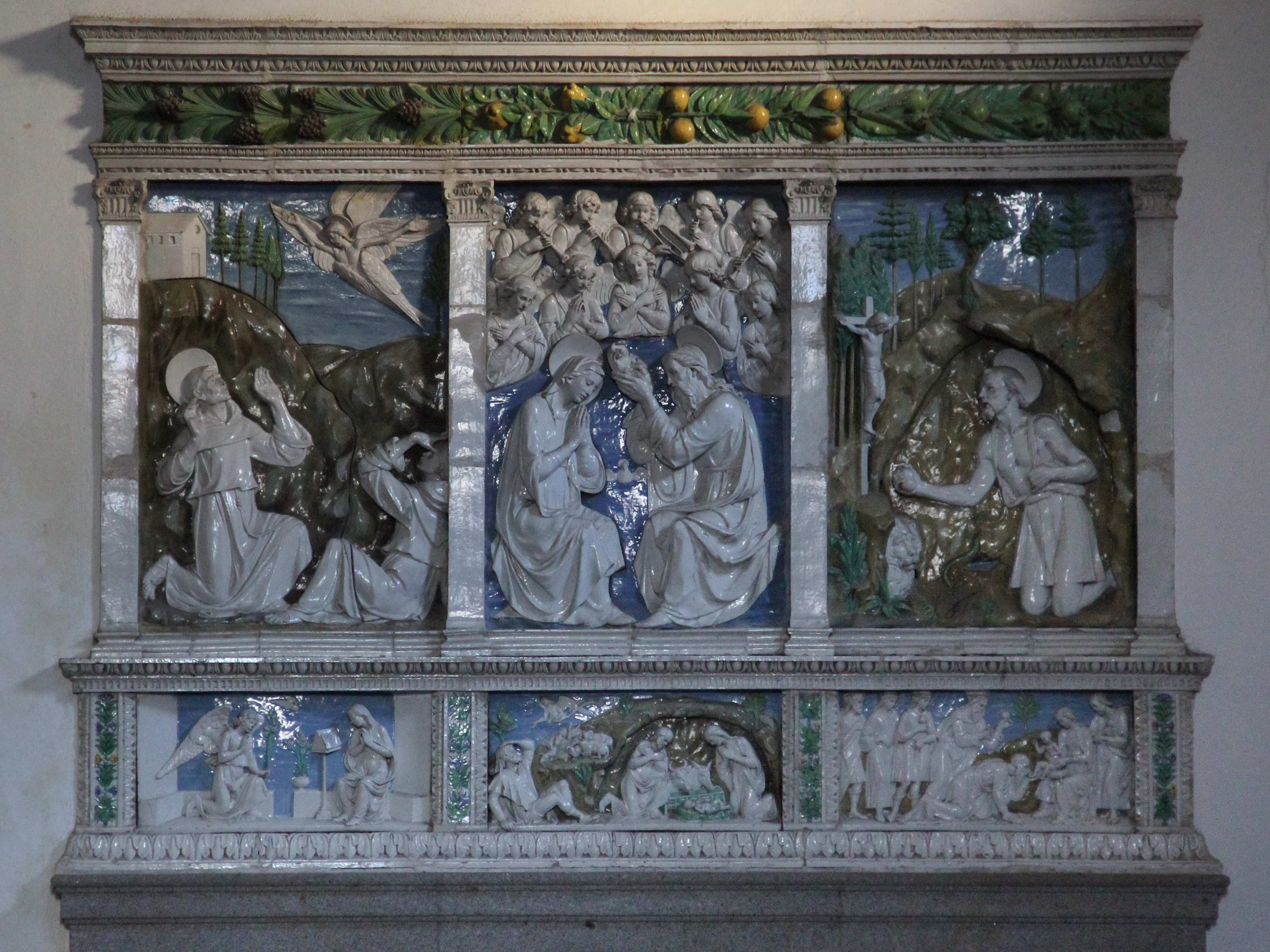 Pieve delle Sante Flora e Lucilla, Santa Fiora, Italy - Andrea della Robbia's work